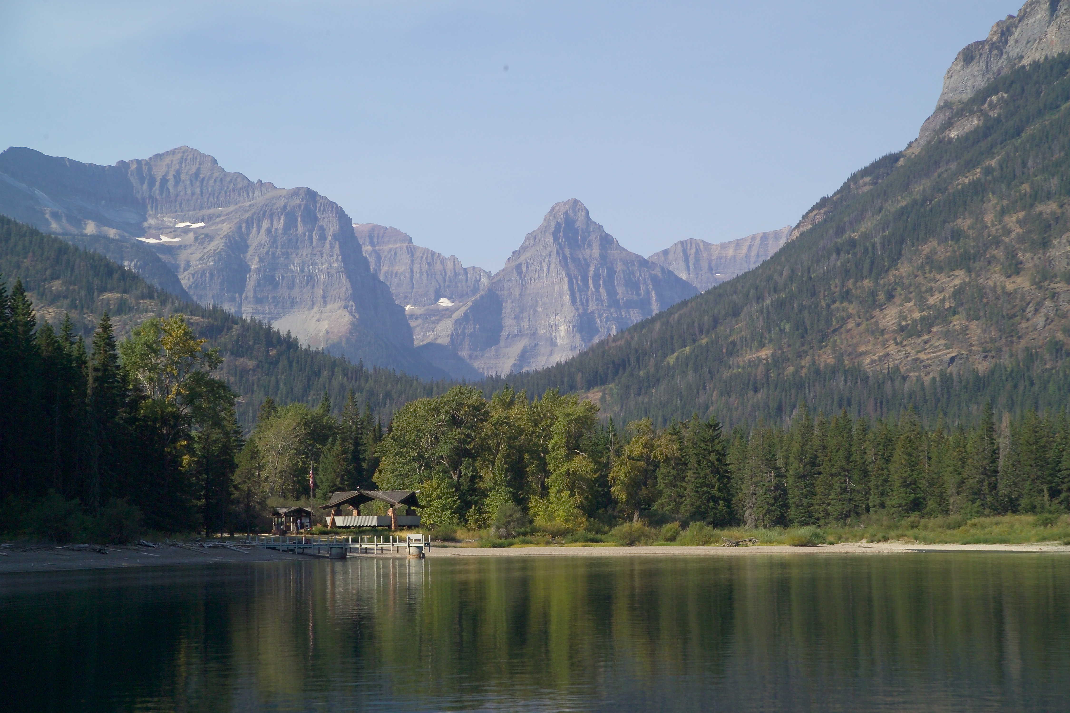 Photo: David Restivo, NPS